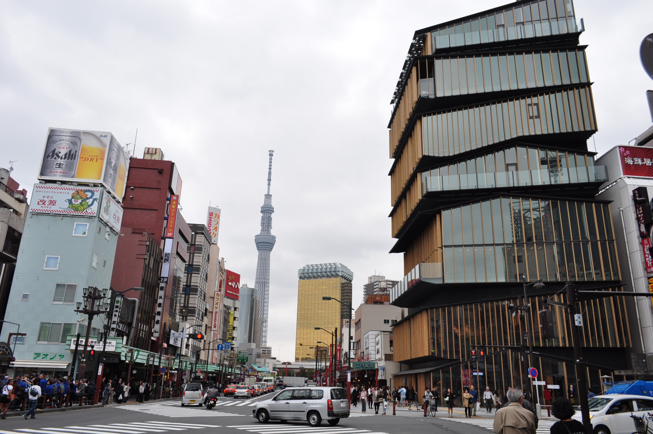 雷門前の観光センター